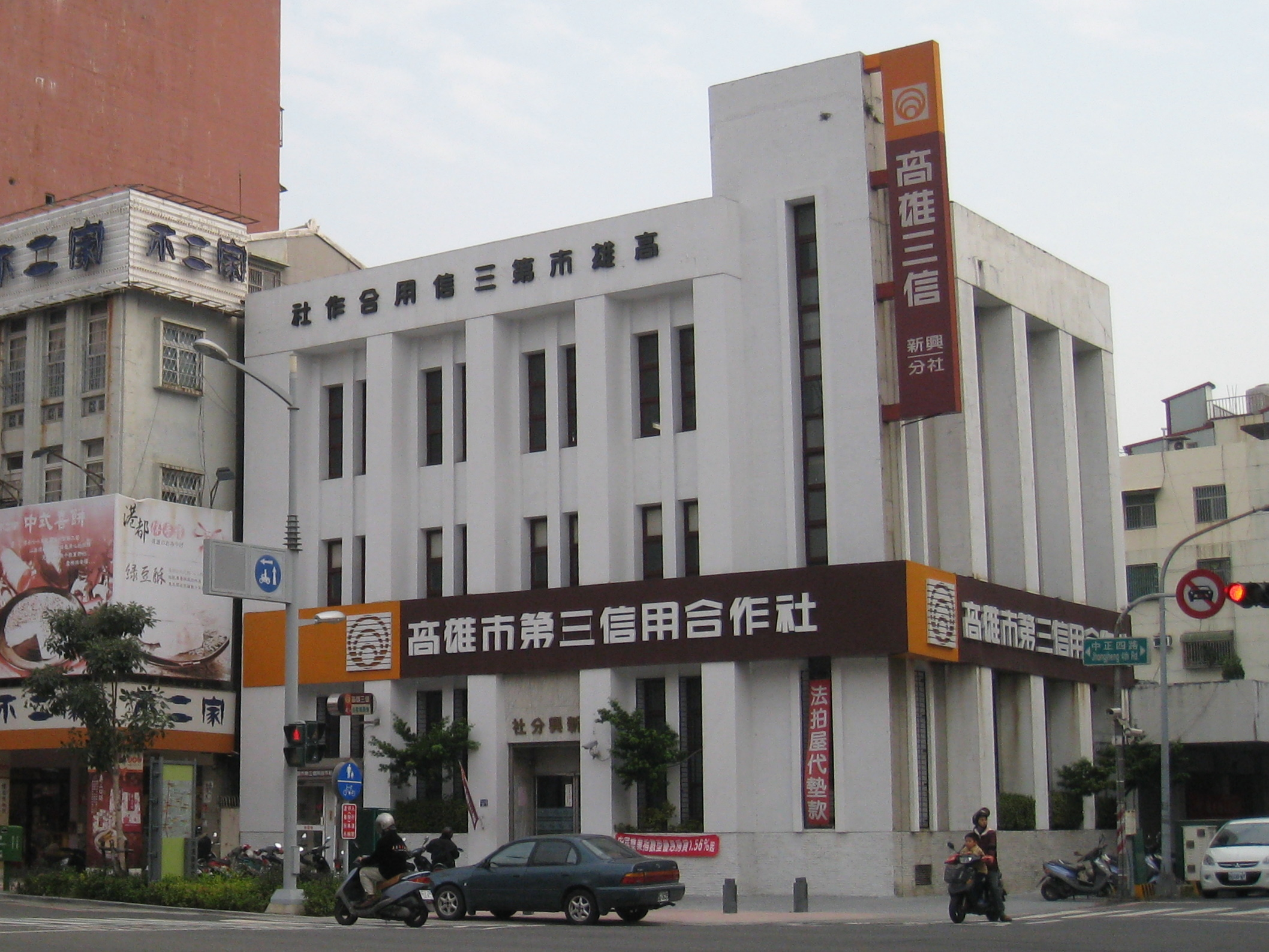 中文（台灣）: 高雄市第三信用合作社新興分社，位於高雄市新興區中正四路37號。